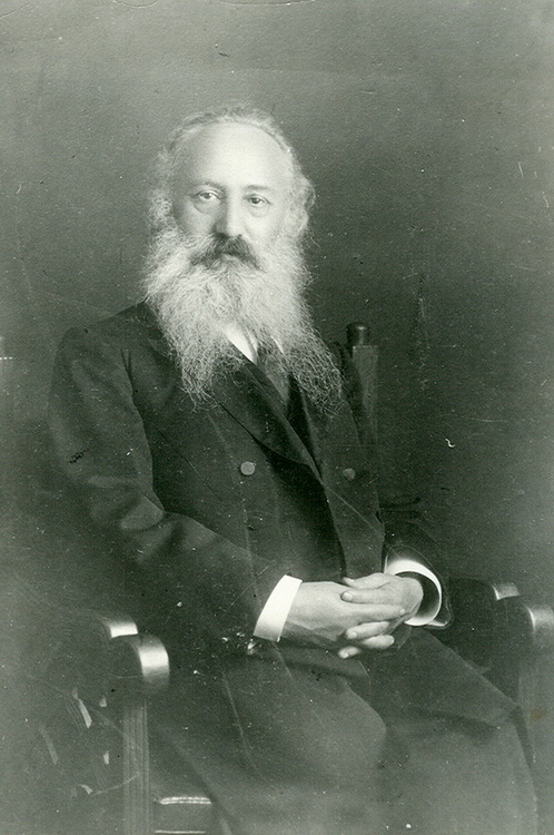 Фёдоров, Евграф Степанович